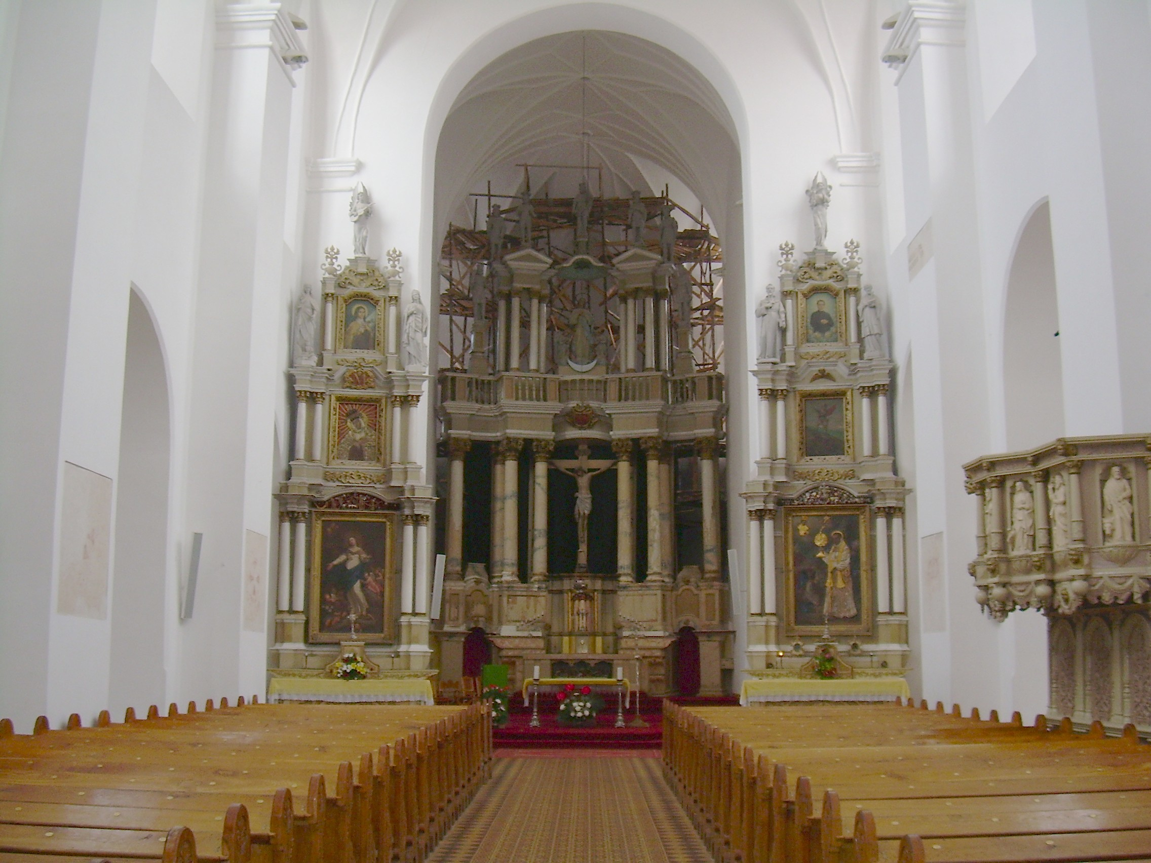 Kretingos Viešpaties Apreiškimo Švč. Mergelei Marijai bažnyčiaБеларуская (тарашкевіца): Касьцёл Зьвеставаньня Найсьвяцейшай Панны Марыі (Крэтынга)